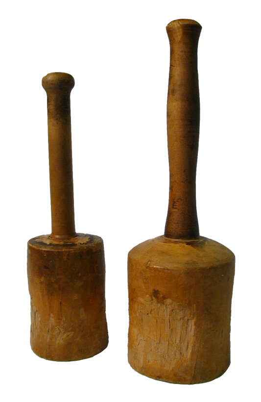 zwei verschieden große Klüpfel